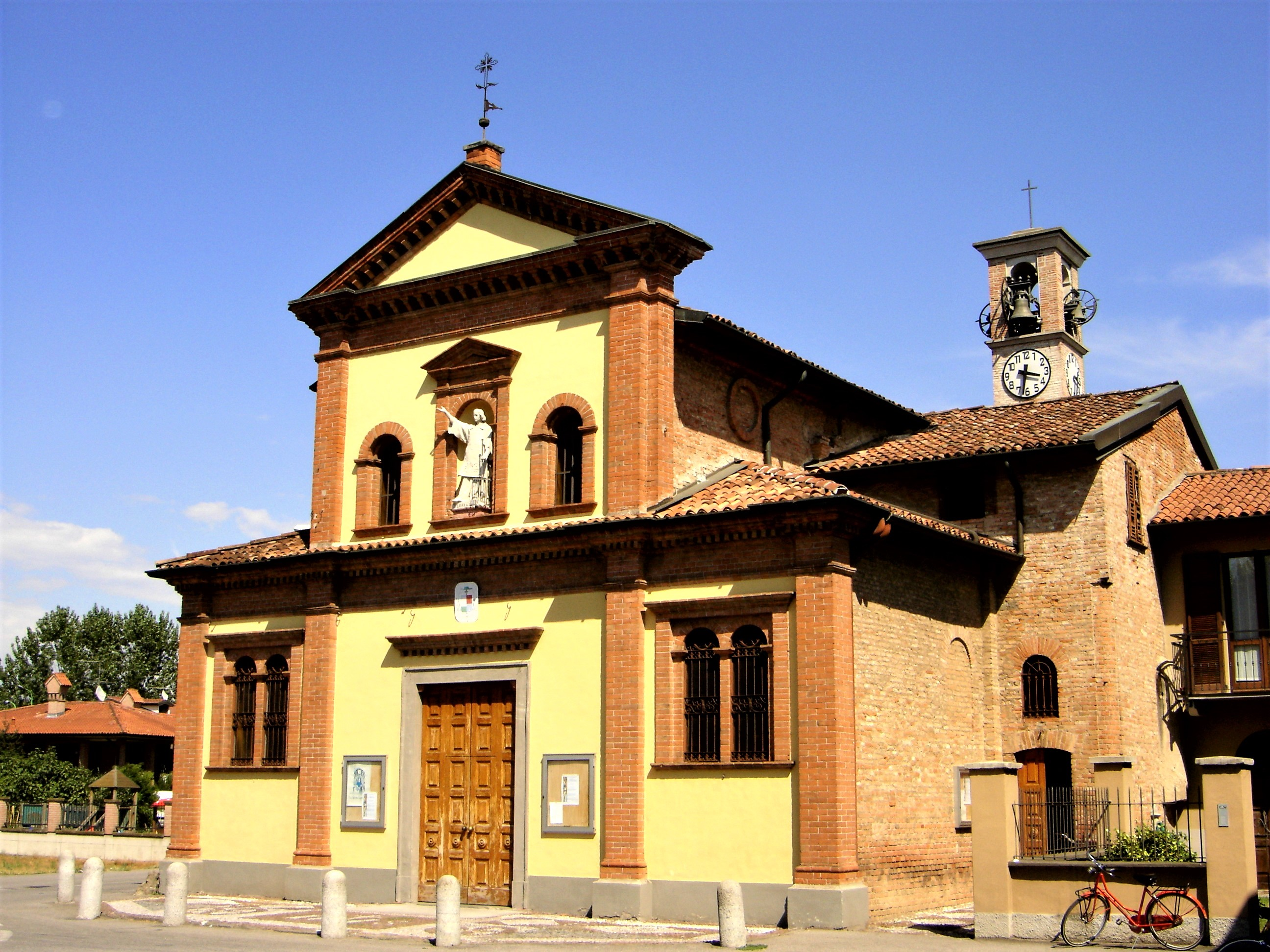 Chiesa di Sola - lato sud-ovest in una giornata di agosto degli anni 2000